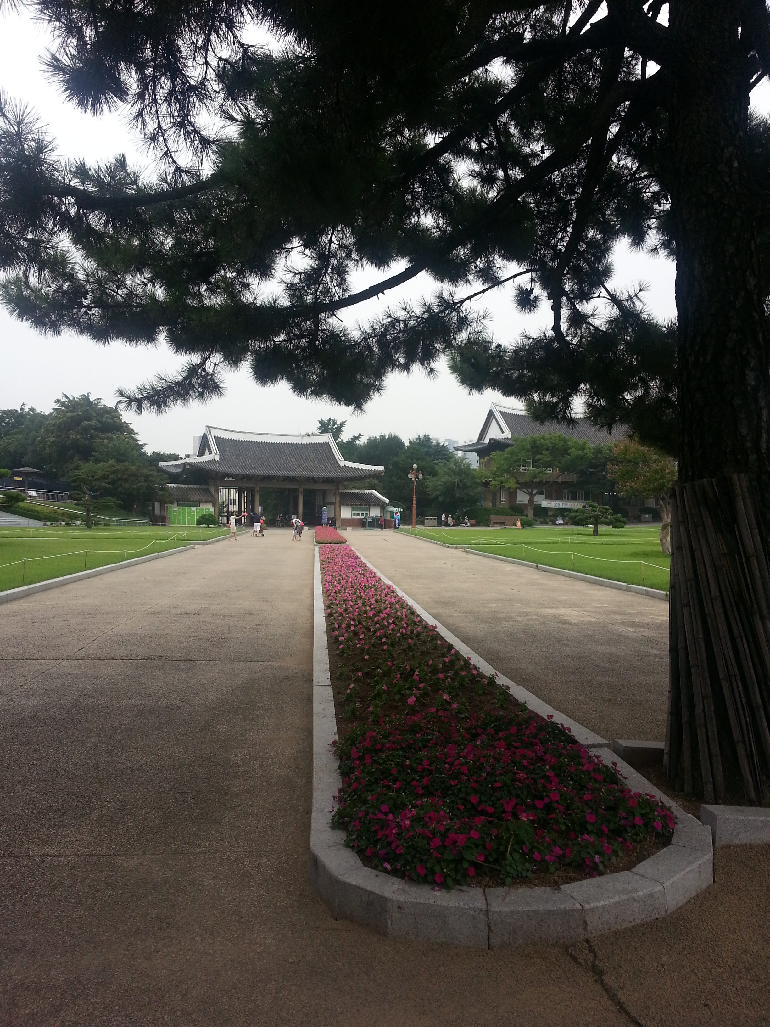 달성공원 (1)